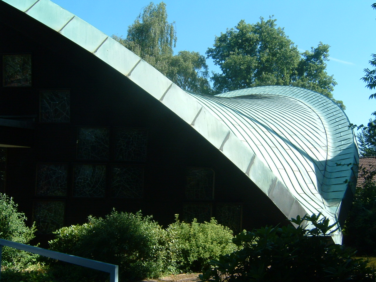 Bremen (Huchting) Golland Kirche